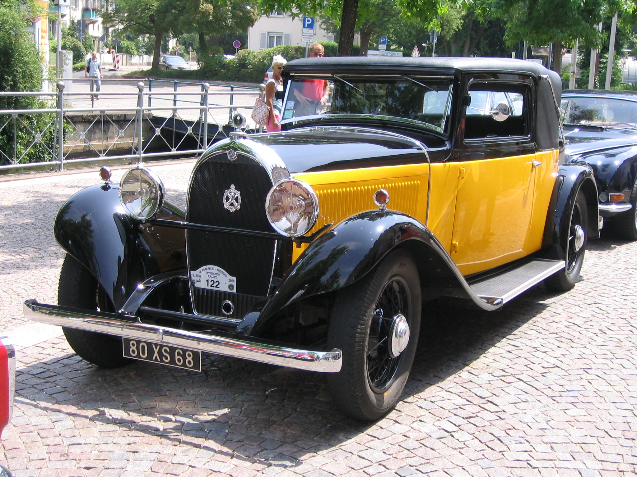 aufgenommen während eines Oldtimer-Treffens im Emmendingen, Deutschland